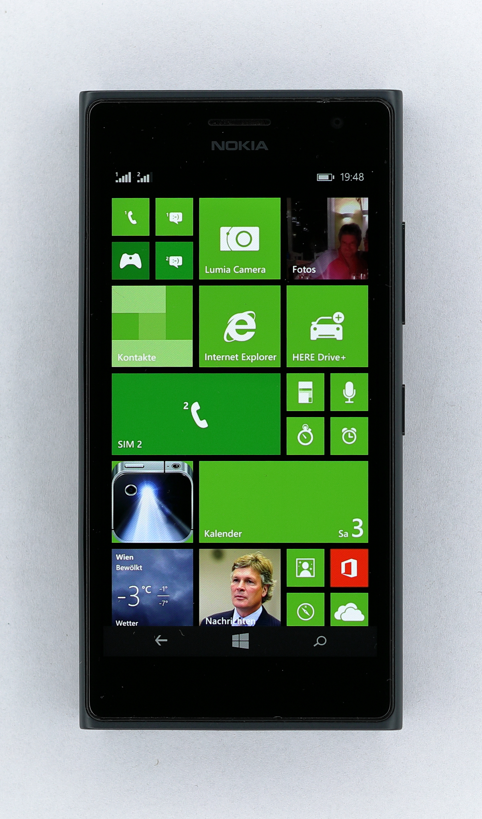 Das Smartphone Nokia Lumia 730 mit benutzerdefiniertem Windows-Phone-8.1-Startbildschirm.